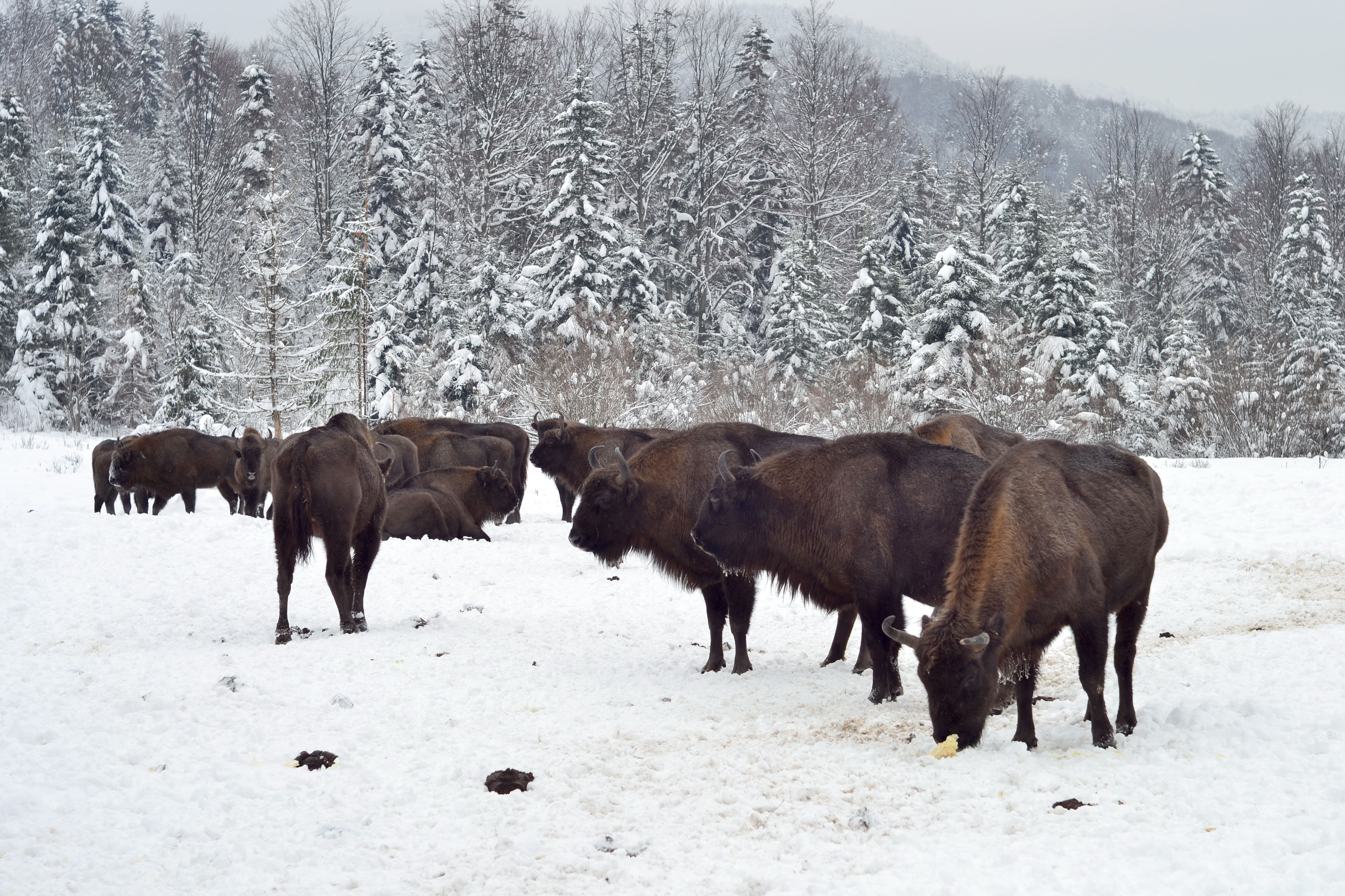 Сколівські Бескиди - національний природний парк (Львівська область, Сколівський, Дрогобицький, Турківський р-ни. Площа 35684 га) - зубри поблизу с. Майдан Дрогобицького р-ну